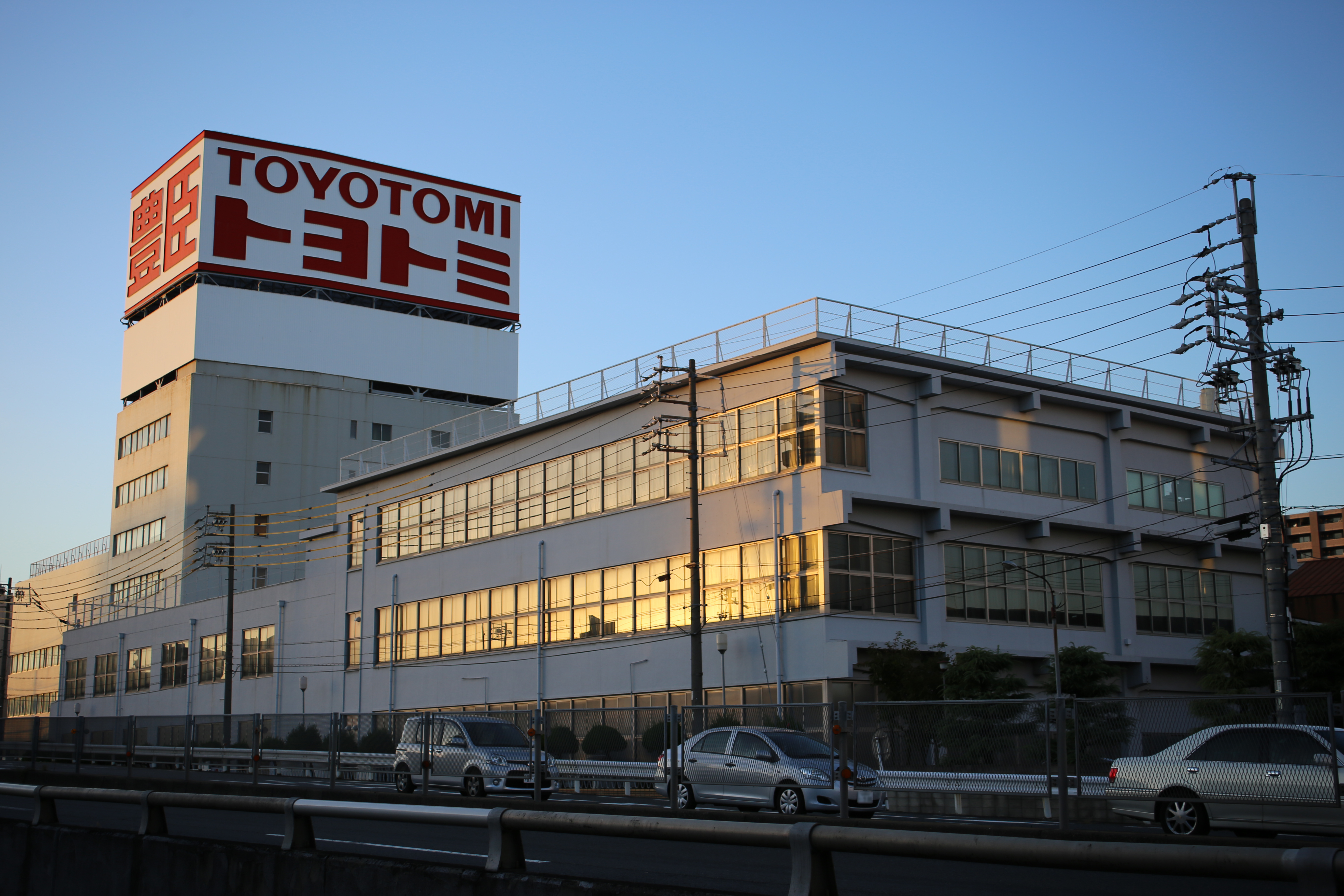 名古屋市瑞穂区桃園町のトヨトミ本社を南側公道東側より撮影。ただし、ナンバープレートにつき画像処理済。